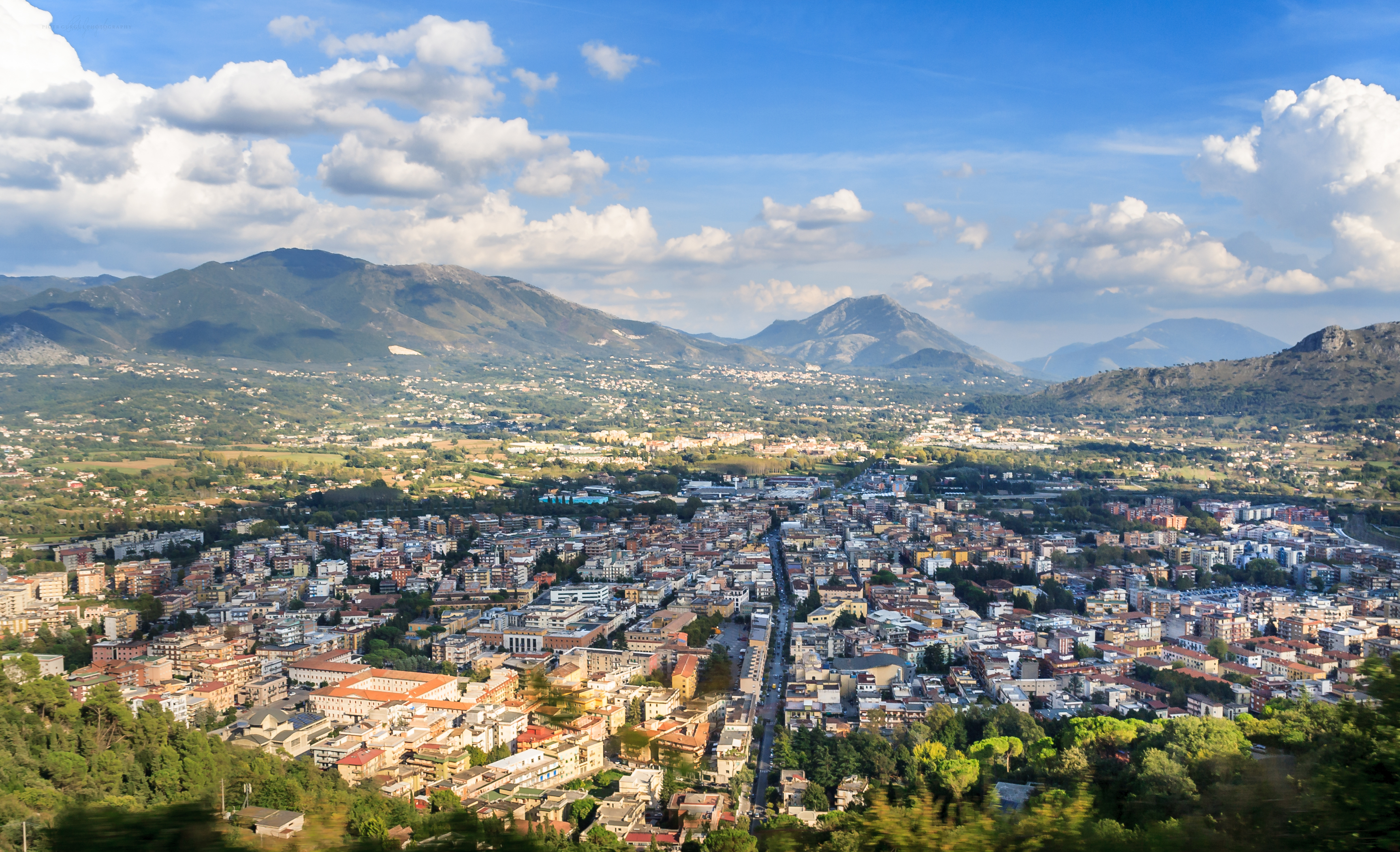 Miasto Cassino